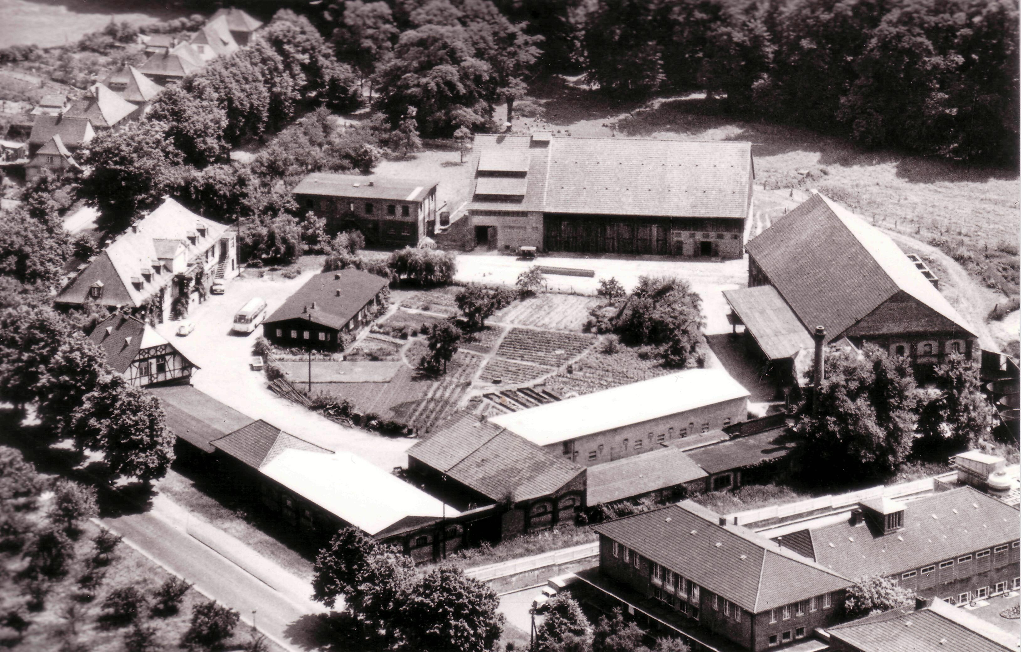 Luftaufnahme von Hofgut Oberfeld um 1950